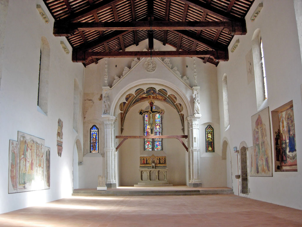 Fotografia dell'interno della Chiesa di San Francesco scattata dall'arch. Gabriele Muccioli durante i Lavori